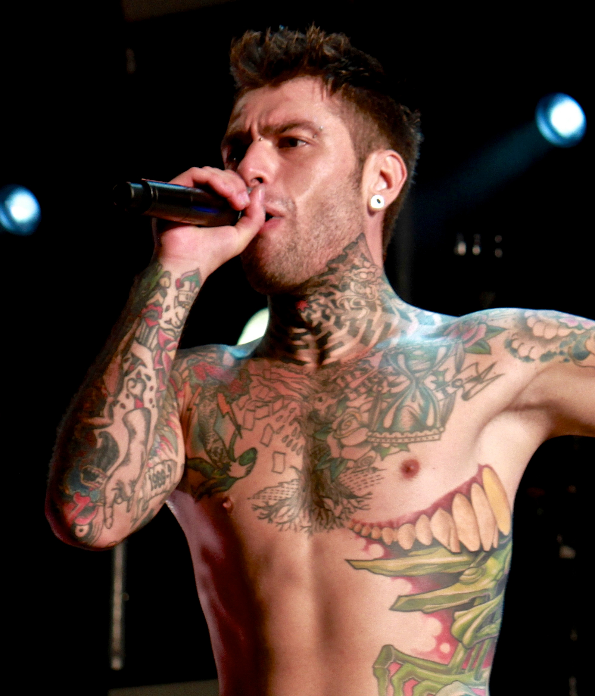 Fedez, Grugliasco (TO), 2015-07-18.